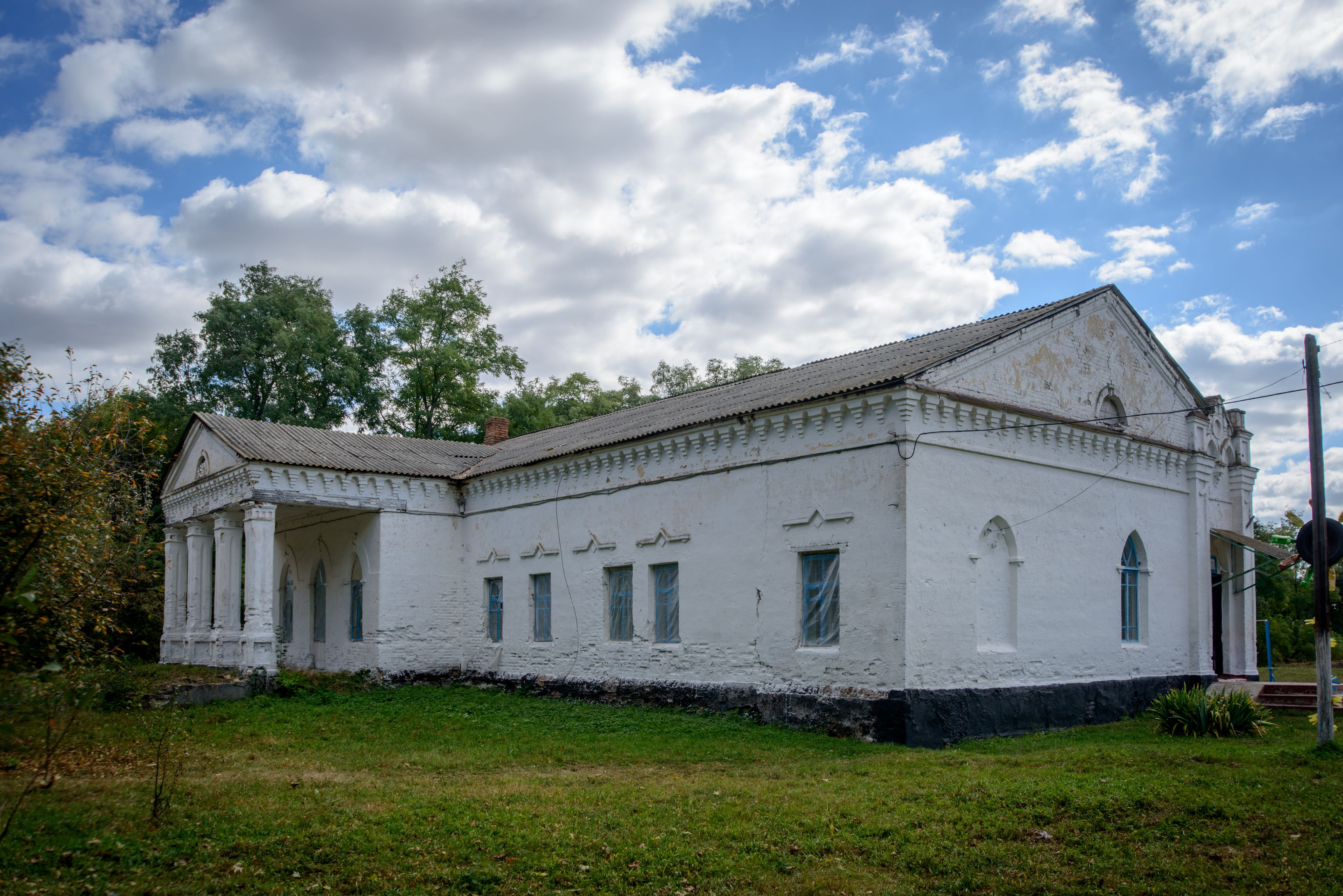 Маєток родини Липських в селі Крячківка Пирятинського району Полтавської області Знято під час Вело-вікі-експедиція селами Гребінківського та Пирятинського районів